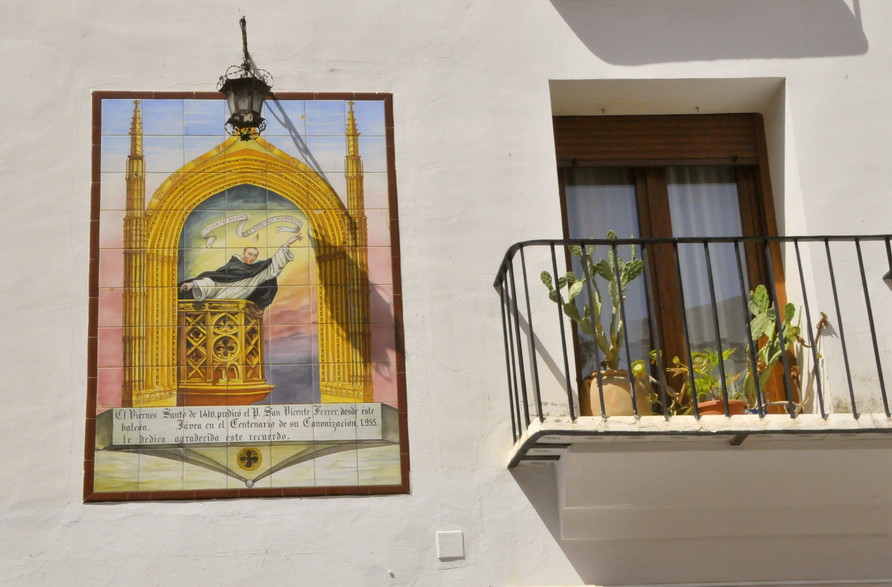 Javea, Placa de l'Esglesia, St.-Vinzenz-Balkon